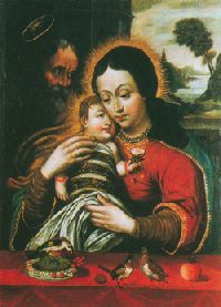 Obraz Matki Bożej Dzikowskiej (Tarnobrzeskiej). 89 cm × 66,5 cm